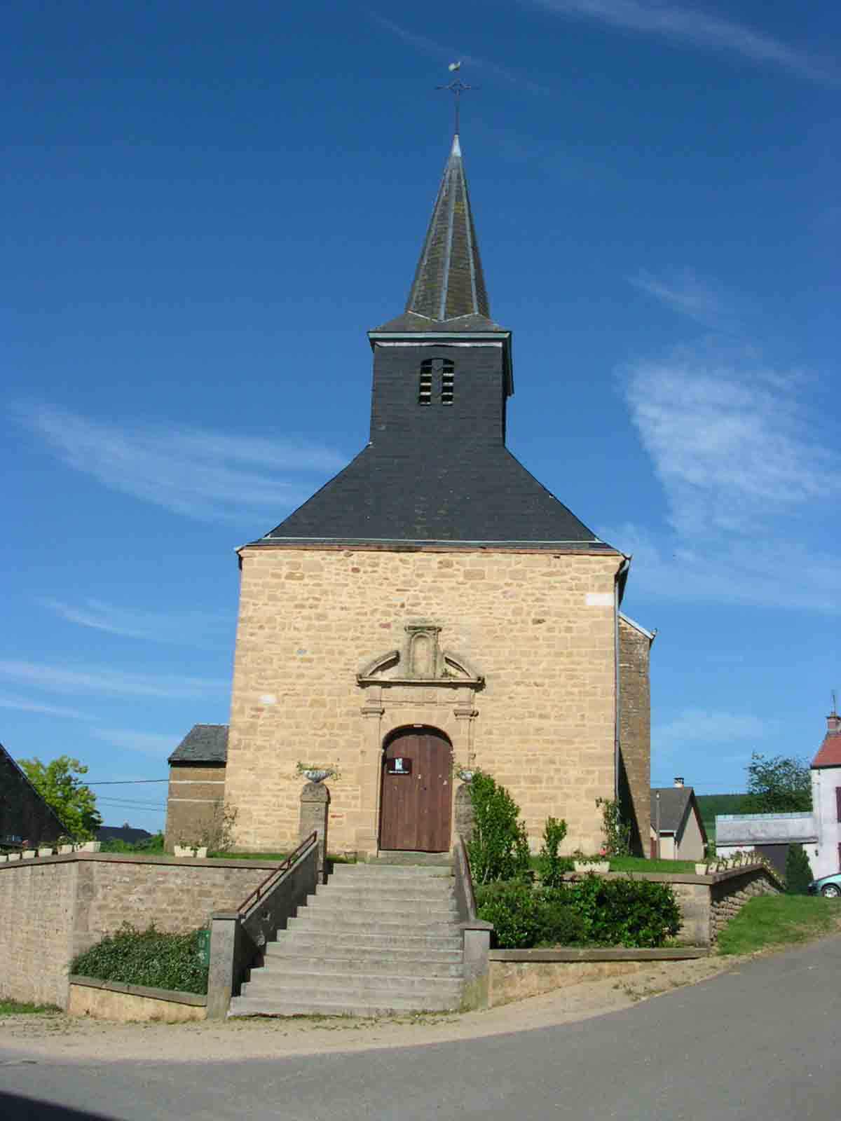 Photographie de l'église Saint-Rémi de Villers-sur-Bar (08) réalisée en 2003 par M. Yvon GALLOT, habitant natif du village.